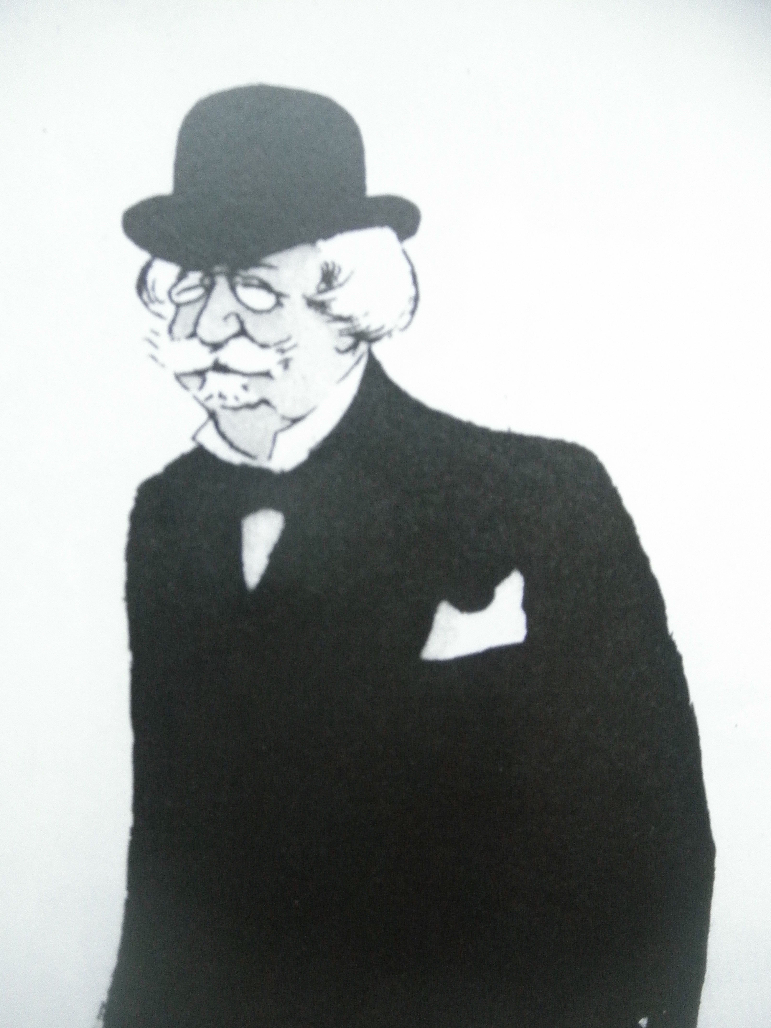 caricature de sem 1898